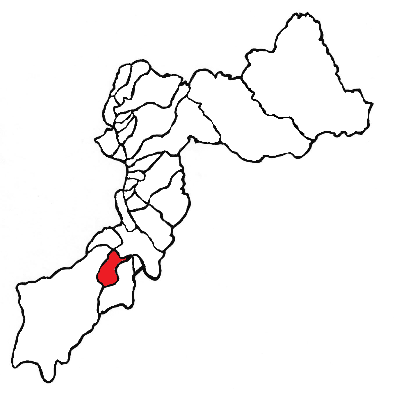 Ubicación del distrito en la provincia de Huancayo, departamento de Junín, Perú